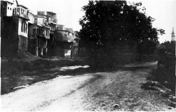 Barada river in Damascus - 1930s